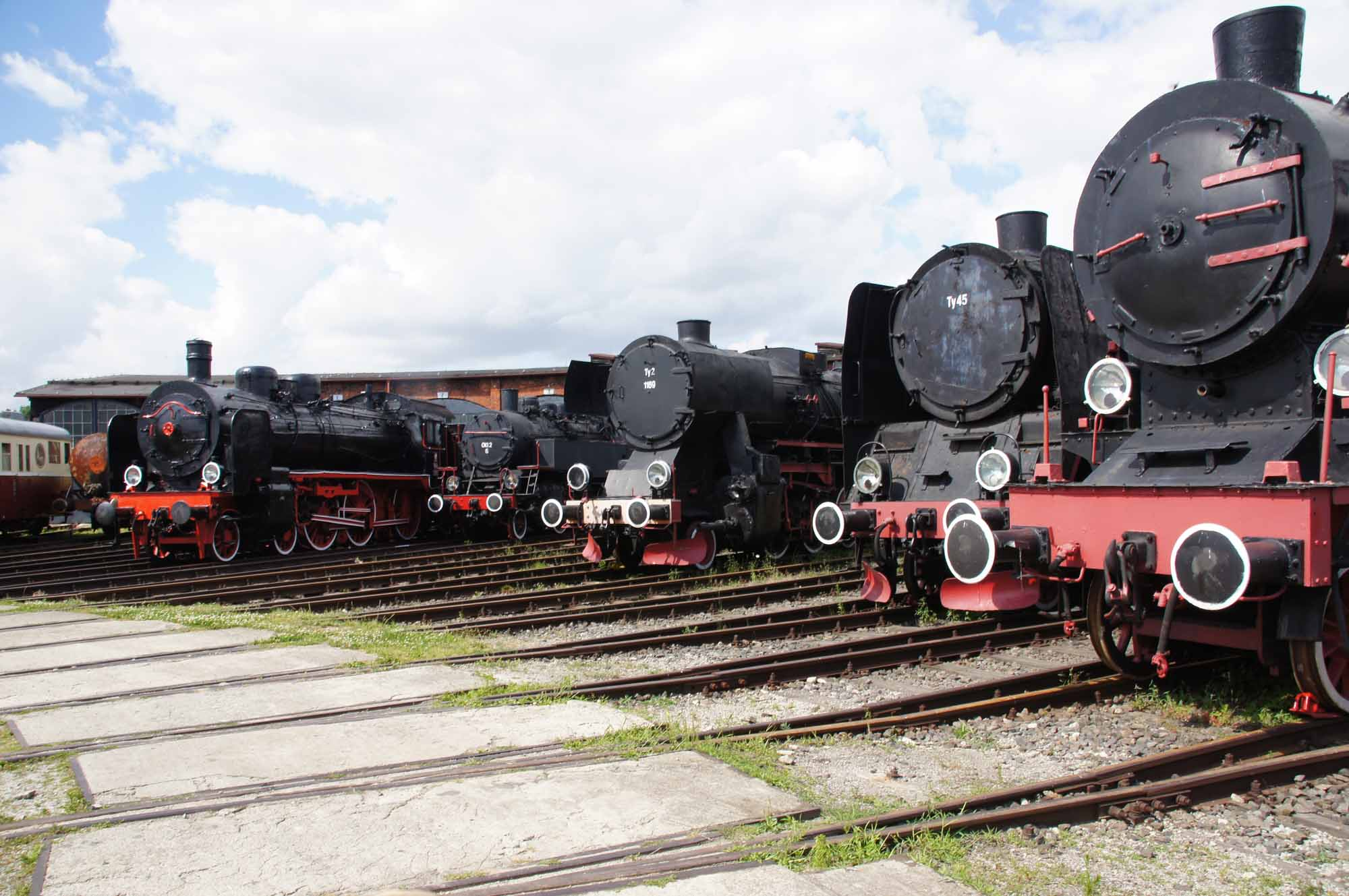 Jaworzyna Śląska, parowozownia wachlarzowa z warsztatami, 1906-1940